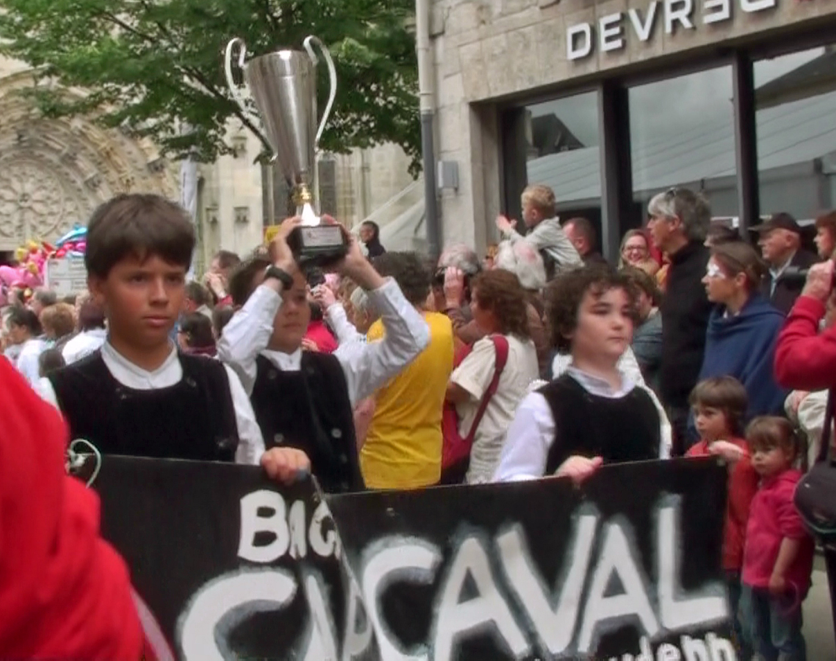 "Défilé en fête". Le Bagadig Cap Caval, vainqueur du championnat des bagadoù de troisième catégorie, lors du festival de Cornouaille 2012 le dimanche 29 juillet pour Kemper en Fête dans les rues de Quimper.